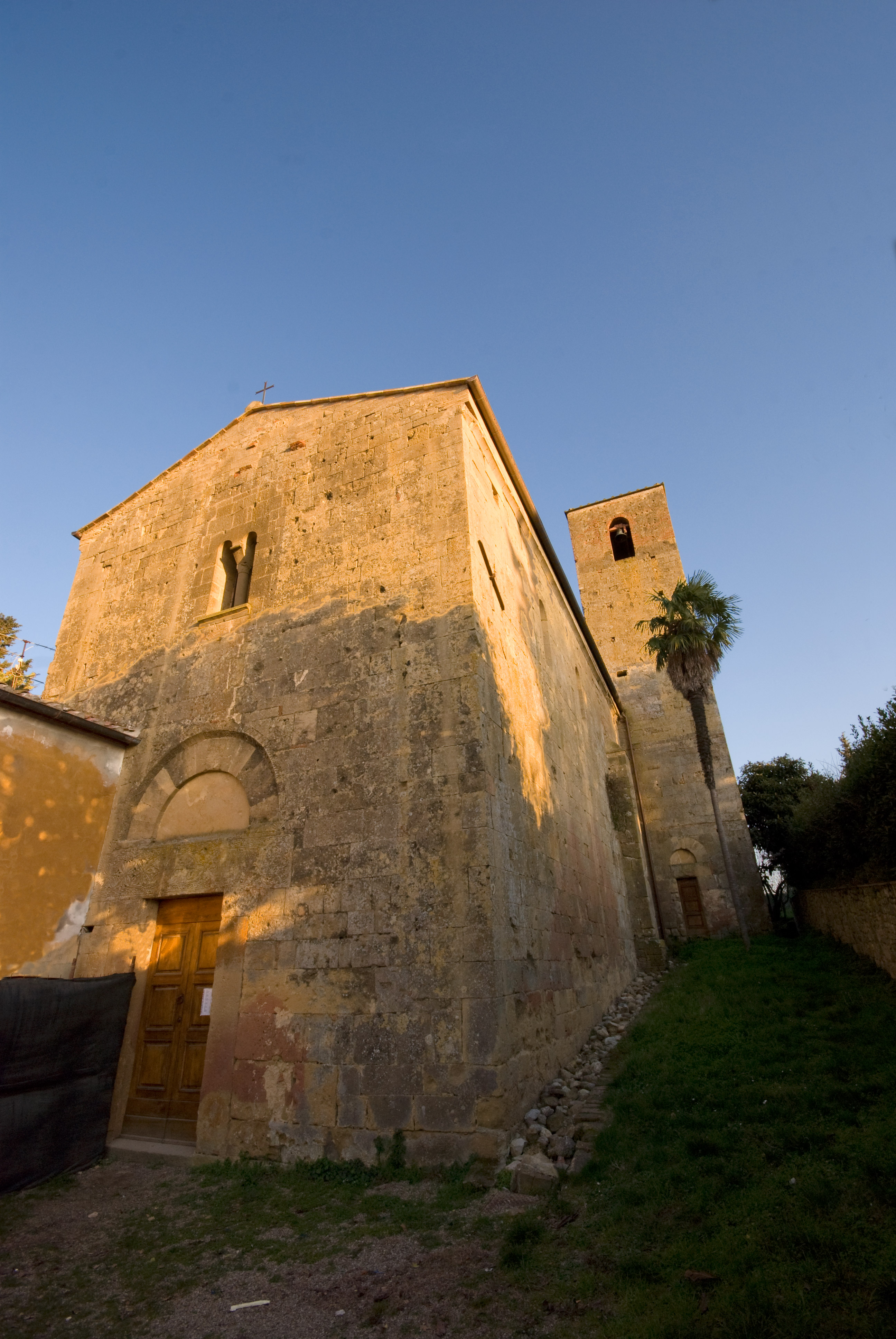 chiesa di san Pietro a cedda (Poggibonsi)